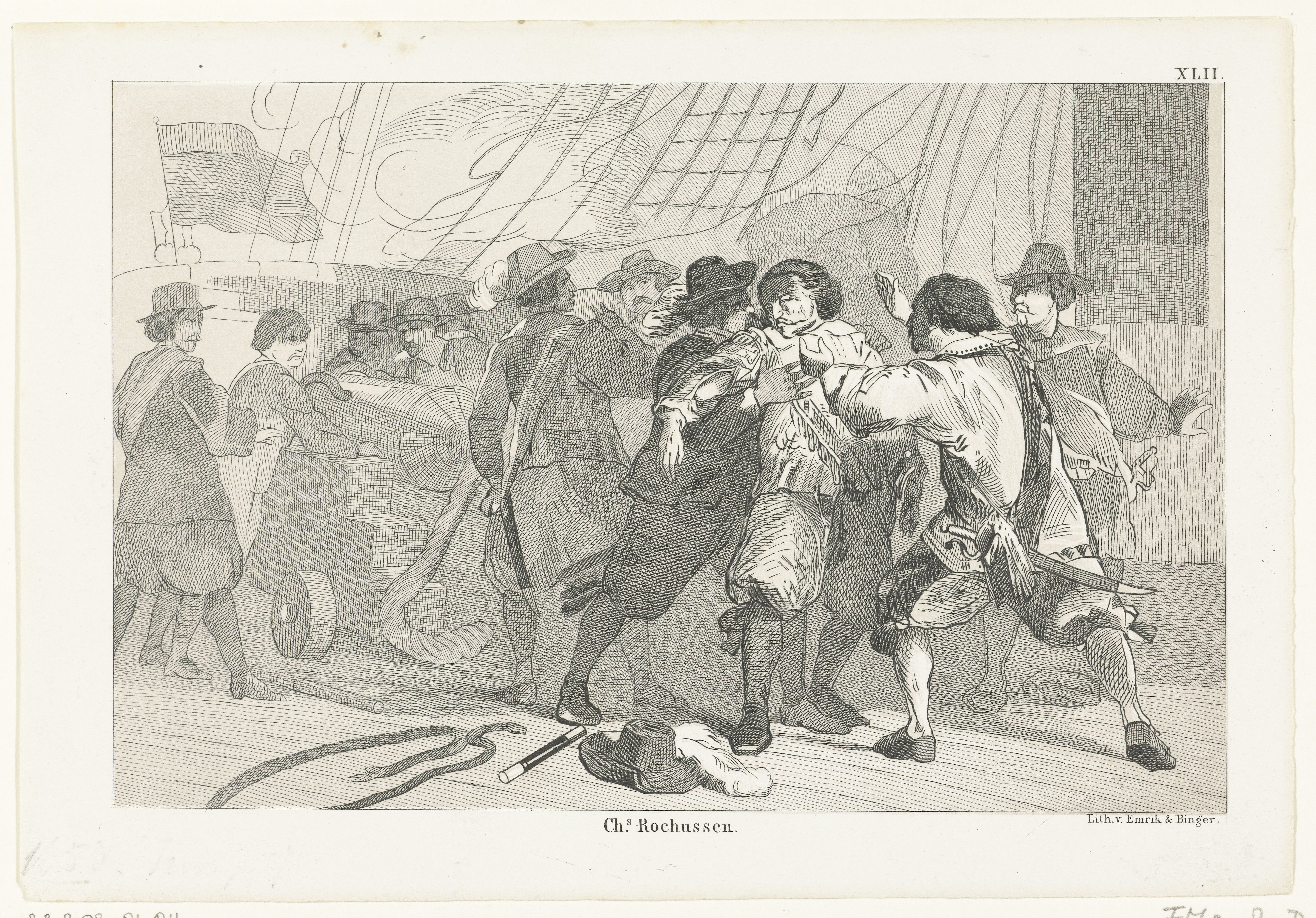 IdentificatieTitel(s): De dood van Tromp, 1653Objecttype: prent historieprent Objectnummer: RP-P-OB-81.811Catalogusreferentie: FMH 2080-DOpmerking: (toegevoegd nummer RPK)FMH 19Atlas van Stolk 22Omschrijving: De dood van Maarten Tromp tijdens de zeeslag bij Terheide in de Eerste Engelse Oorlog tussen de Staatse vloot onder Maarten Tromp en de Engelse vloot onder George Monck, 10 augustus 1653. Maarten Tromp is geraakt door vijandelijk vuur en wordt opgevangen door leden van zijn bemanning.VervaardigingVervaardiger: prentmaker: anoniemnaar ontwerp van: Charles Rochussen (vermeld op object)drukker: Emrik & Binger (vermeld op object)Plaats vervaardiging: NederlandDatering: 1853 - 1861Fysieke kenmerken: toonlithografie in zwart met een toonblok in grijsMateriaal: papier Techniek: toonlithografieAfmetingen: blad: h 164 mm × b 236 mmToelichtingGebruikt als illustratie in: Jacob van Lennep, De geschiedenis des vaderlands in schetsen en afbeeldingen, Binger, Amsterdam 1855-1861, 8 delen, pl. XLII. Dit nummer is een door het RPK toegevoegd nummer en staat niet in Frederik Muller, het werk Waar: de prent voor is gemaakt of uit afkomstig is, staat wel vermeld in Frederik Muller.OnderwerpWat: violent death, being killed; being mishandled and maltreated; seeking deathZeeslag bij TerheideWanneer: 1653-08-10 - 1653-08-10Wie: Maarten Harpertszoon TrompVerwerving en rechtenVerwerving: aankoop 1881Copyright: Publiek domein